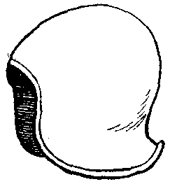 Барбют ранняга ўзору